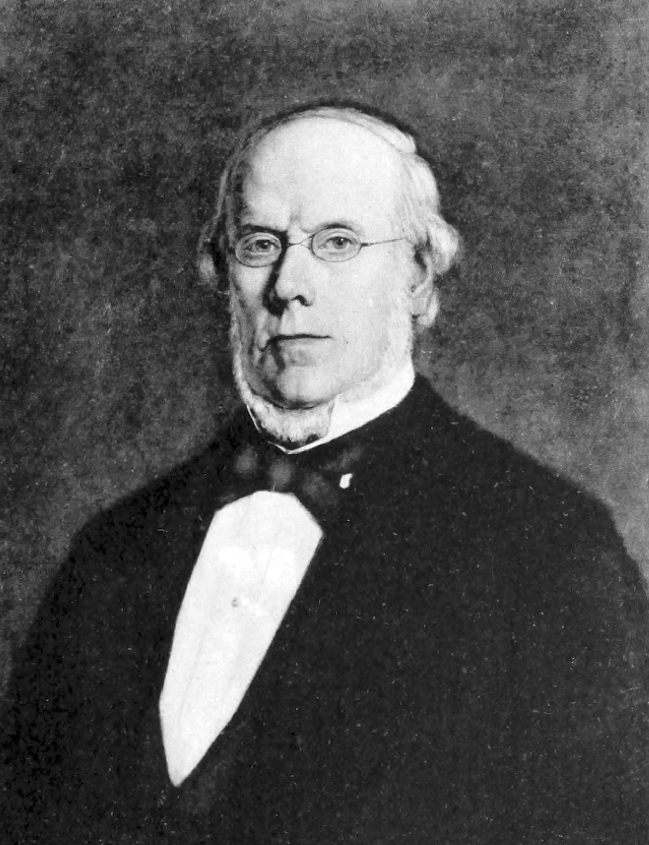 Fredrik Theodor Berg (1806-1887)